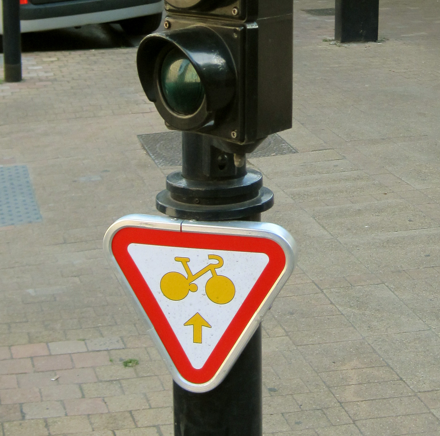 Panneau signalant la possibilité pour les cyclistes de passer au feu rouge s'ils vont tout droit